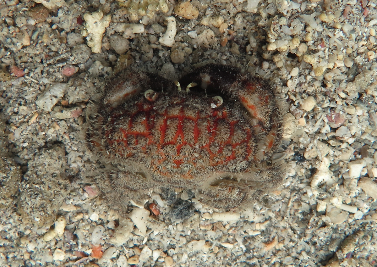 Actaeodes hirsutissimus à la Réunion.